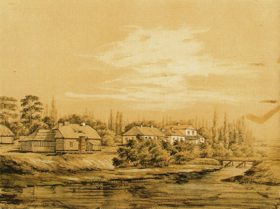 Беларуская (тарашкевіца): Пятровічы (Piatrovičy), сядзіба Дзяконскіх (Dziakonski)